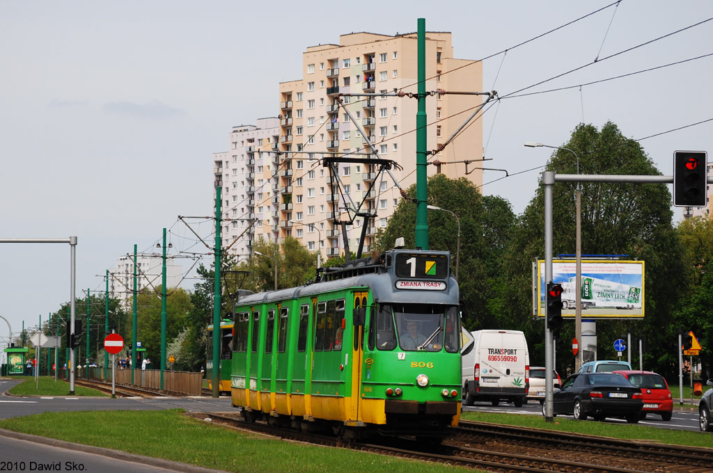 Beijens #806 na linii 1.